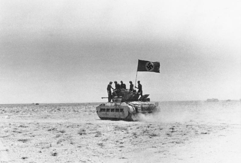 Bei den Soldaten des Deutschen Afrika-Korps Ein erbeuteter englischer Tank, von Truppen des deutschen Afrikakorps wieder flottgemacht, rollt mit wehender Fahne über eine Wüstenstrasse im Kampfgebiet von Tobruk.